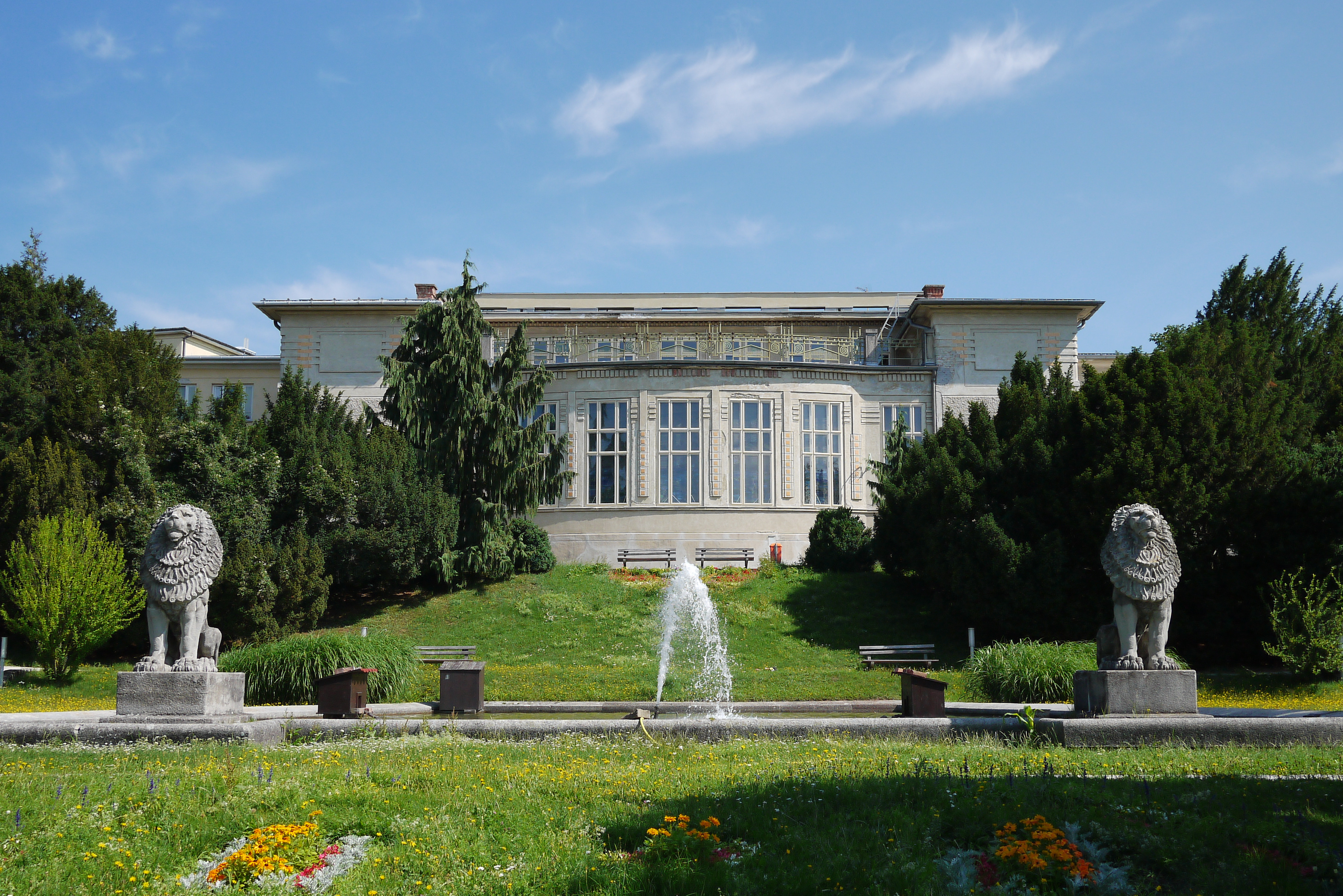 Pulmologisches Zentrum, Otto Wagner-Spital